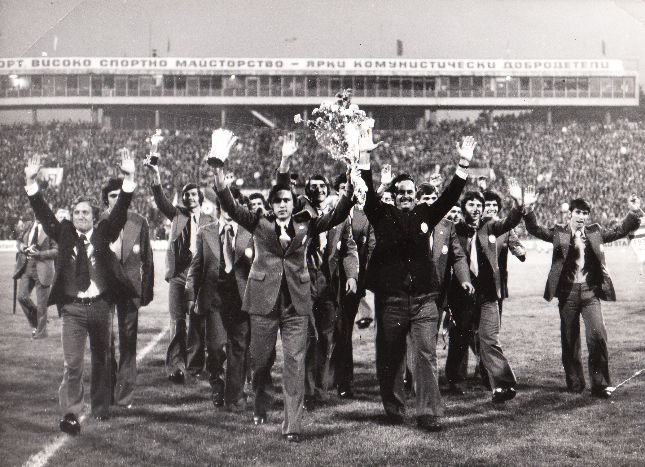 Европейско 1974г.